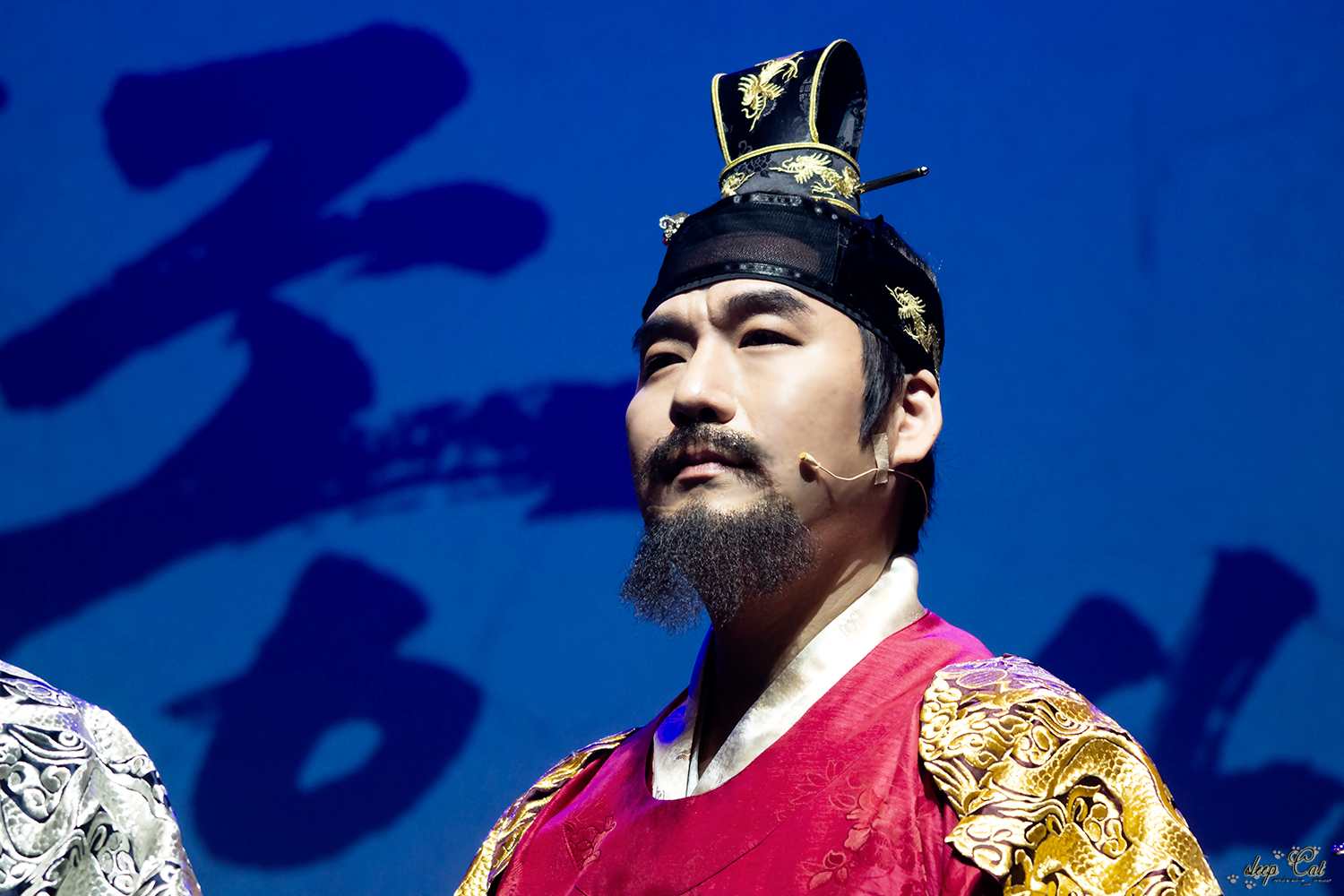 뮤지컬 여민락콘서트 정상윤 배우님